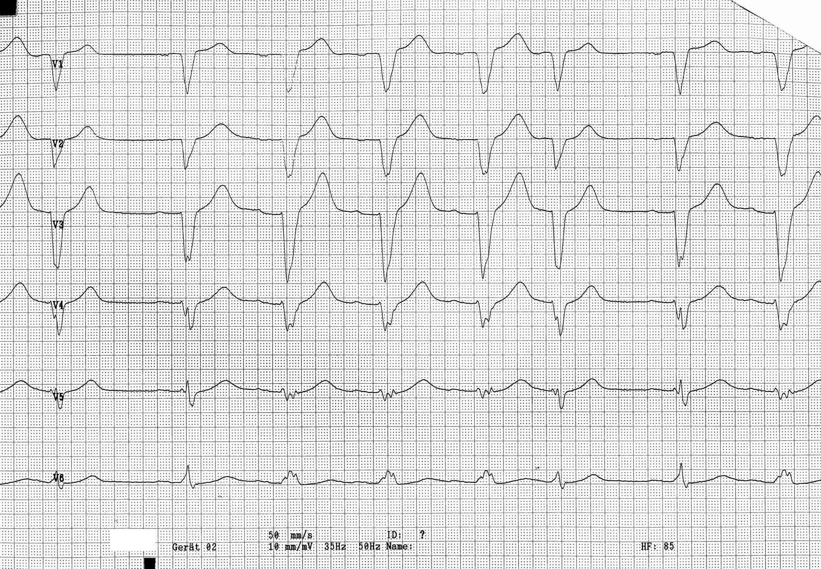 ECG left branch block, VES de: Siehe Bild:ECG 007 a.jpg